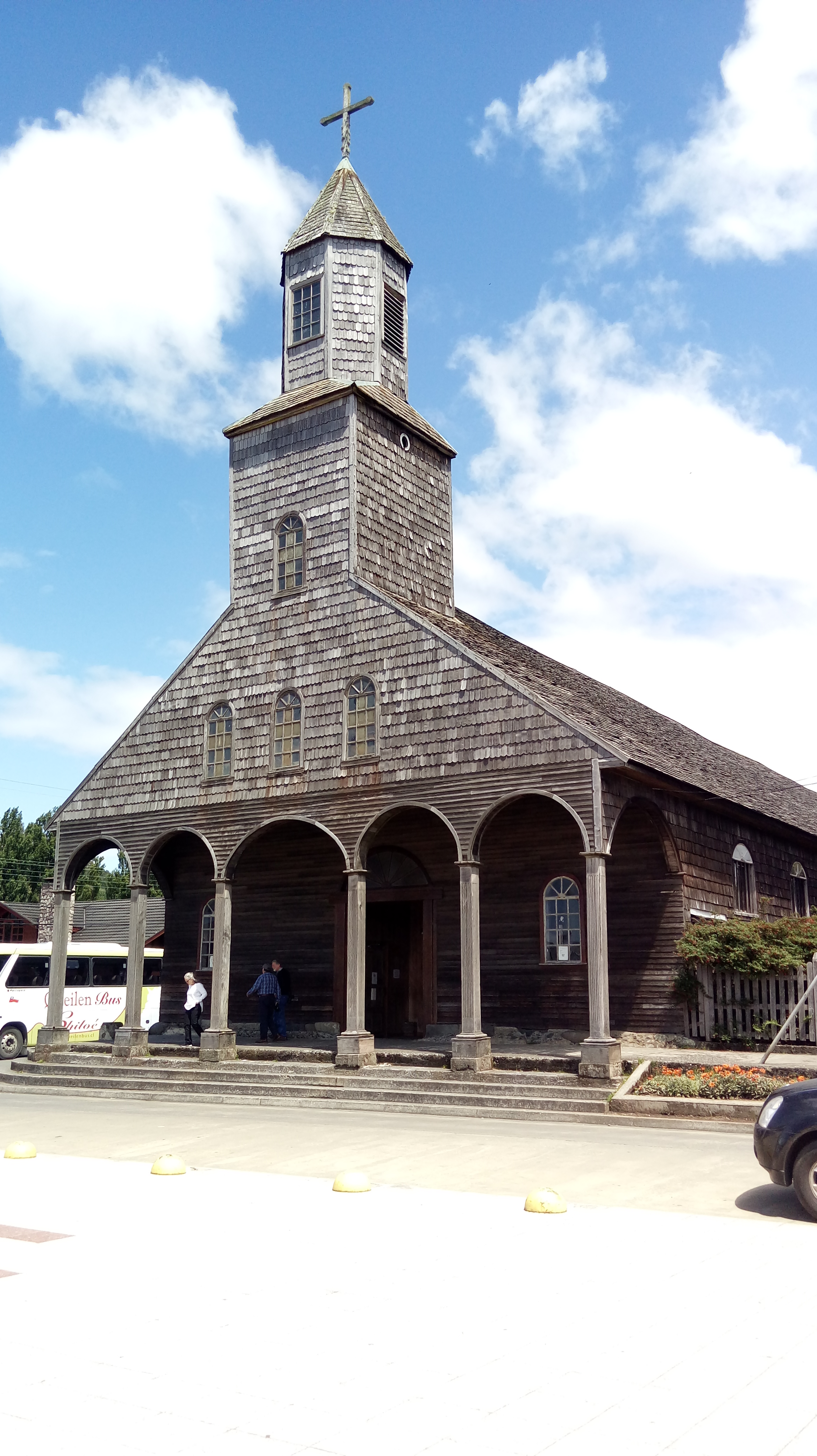 Iglesia Achao